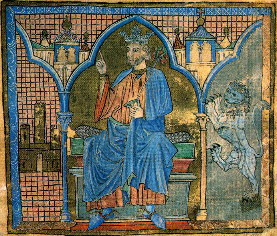 Fernando III, rei de Castela e Toledo (1217-1252) e de Galiza e León (1230-1252), nunha miniatura do Tombo A da catedral de Santiago de Compostela, Galiza.